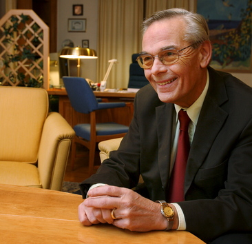 Odd Reinsfelt (H) er Bærums lengstsittende ordfører.